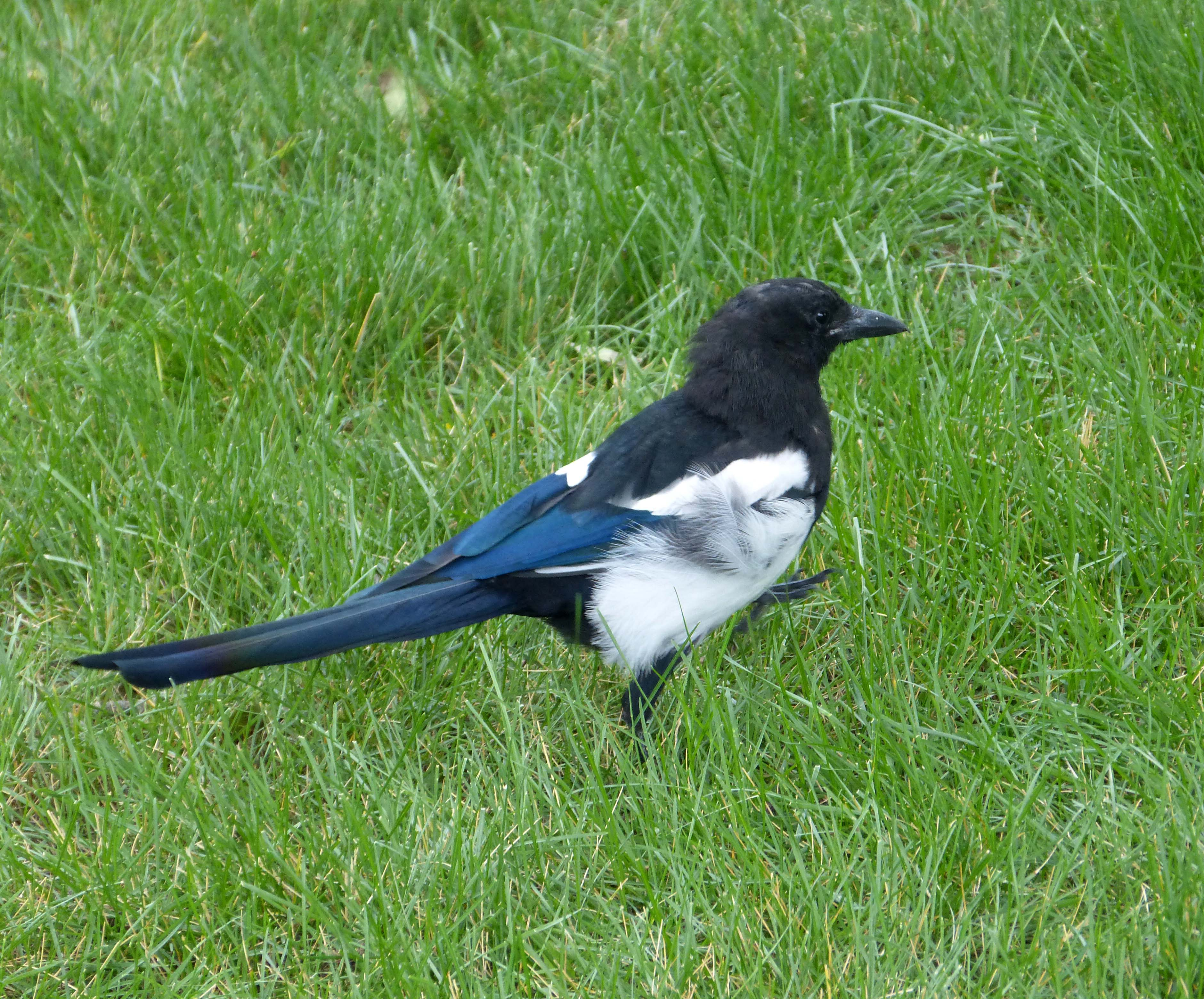 Banff. Canada